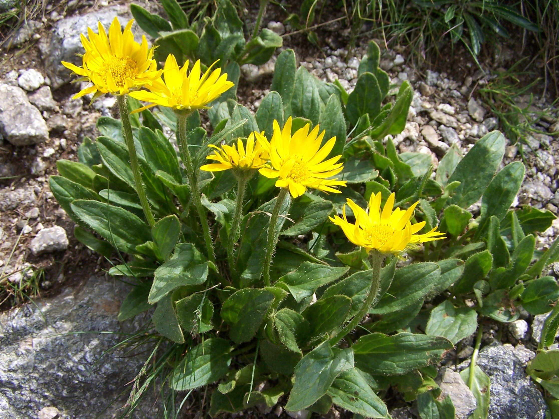 Doronicum clusii (pl. omieg kozłowiec), habitat: West Tatra Mountains, Ciemniak